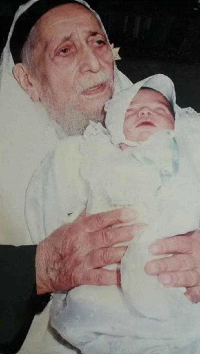 הרב רפאל כדיר צבאן בברית לנכדו צור יגאל יפרח, בן חתנו אברהם יפרח. כ"ז באדר ה'תשנ"ד (10.3.94), אולמי "לוגסי" בנתיבות